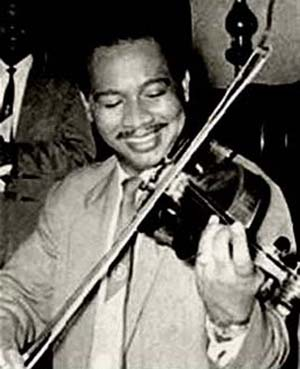 Enrique Jorrín playing violin, Cuba, 1950s.